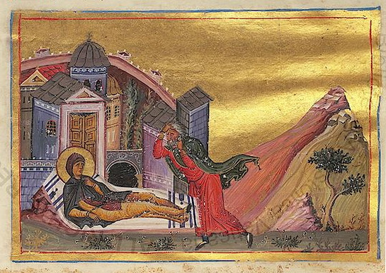 Преподобная Евфросиния Александрийская Константинополь. 985 г. Миниатюра Минология Василия II. Ватиканская библиотека. Рим.